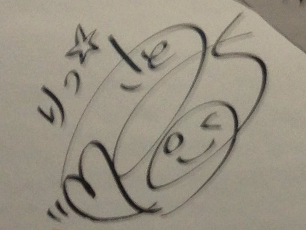 《K-ON！輕音部》田井中律聲優佐藤聰美的簽名。